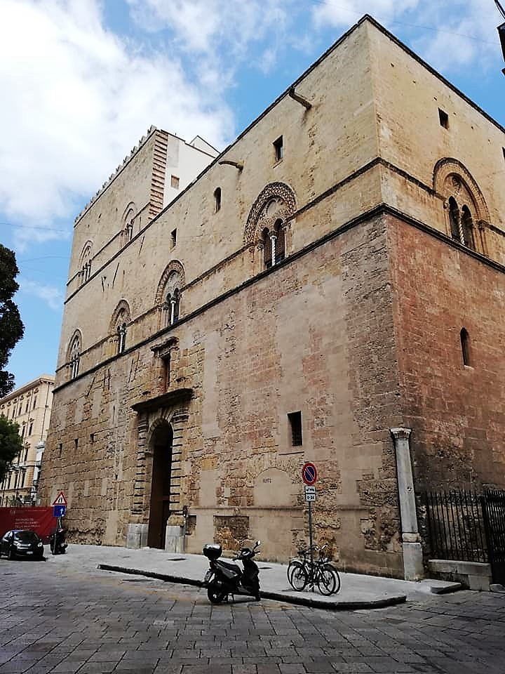 Prospetto di piazza Marina.